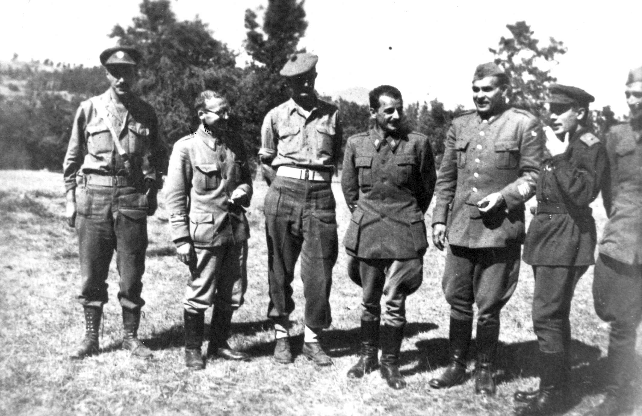 Srpskohrvatski / српскохрватски: Članovi partizanskog Glavnog štaba Srbije sa predstavnicima stranih misija na Radan planini 1944. Na slici: 2) Moma Marković, 3) Ficroj Maklin, 4) Koča Popović, 5) Sreten Žujović, 7) Rudolf Primorac